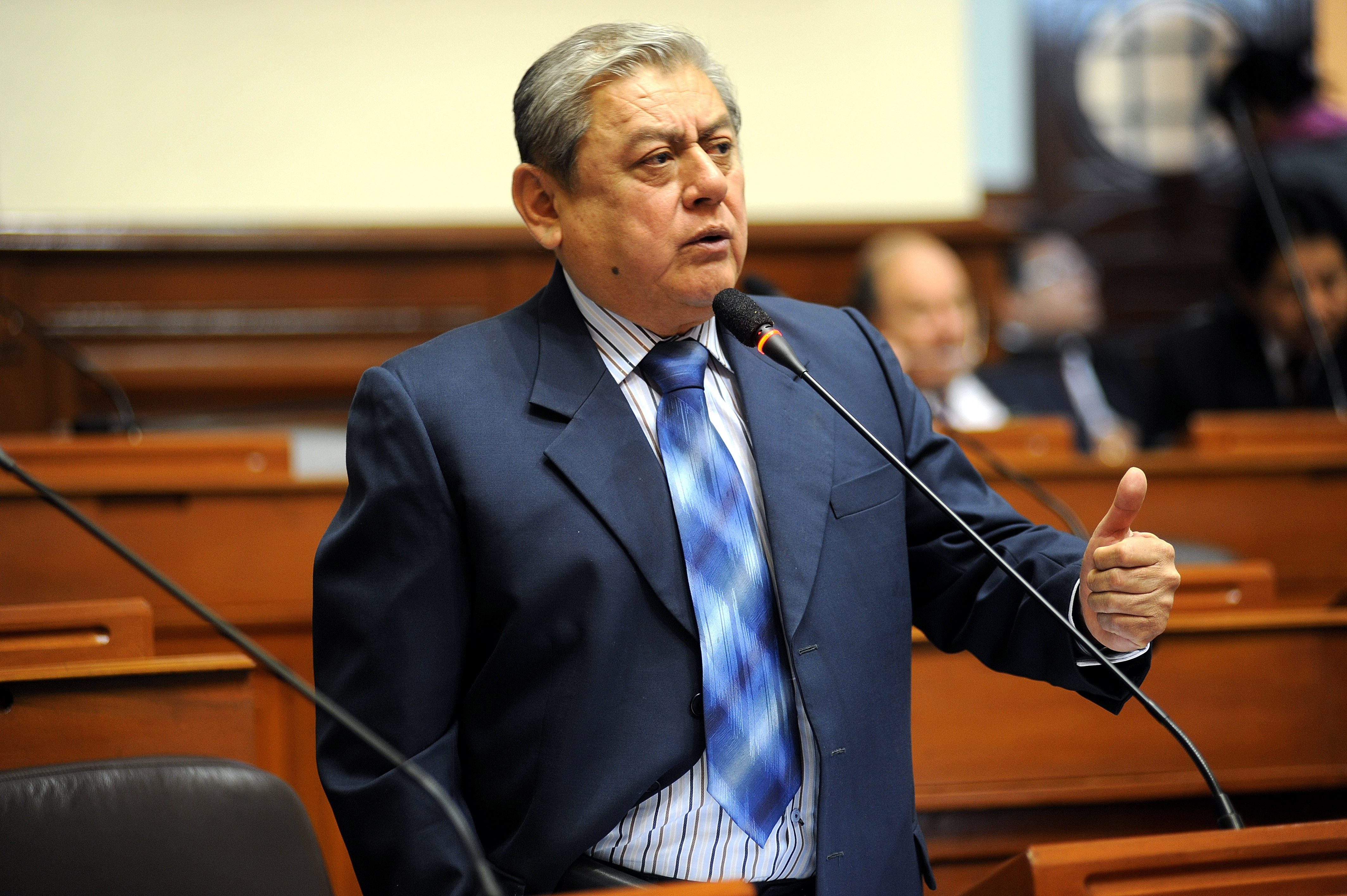 El legislador Luis Falla expresa su posición en el debate parlamentario realizado esta mañana por el Pleno congresal.